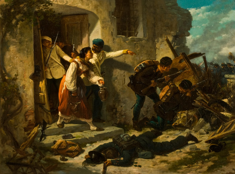 Un episodio della battaglia di s martino 1861